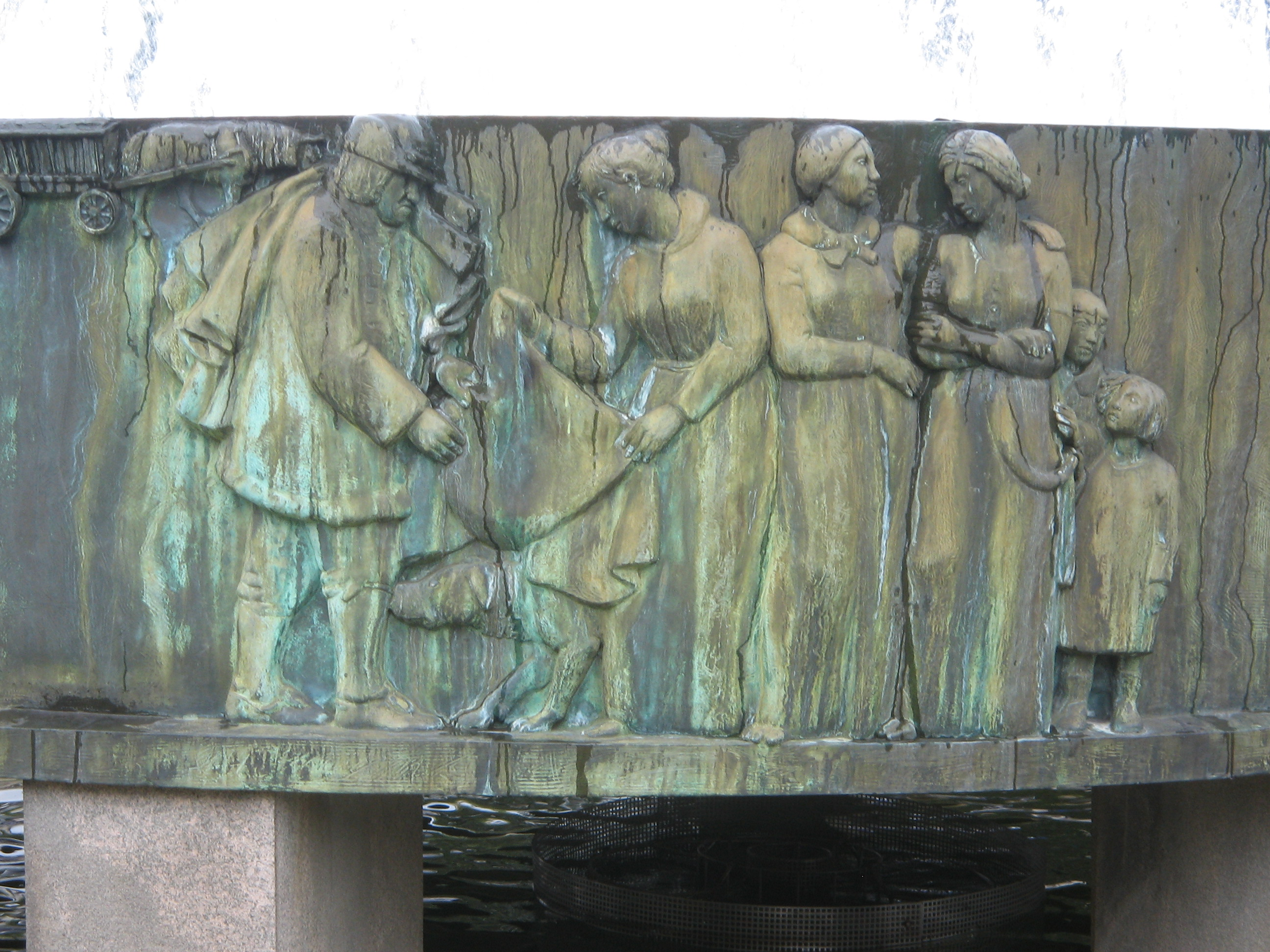 Nils Sjögrens Sjuhäradsbrunnen på Stora torget i Borås, invigd juni 1941. Detalj söder,knalle